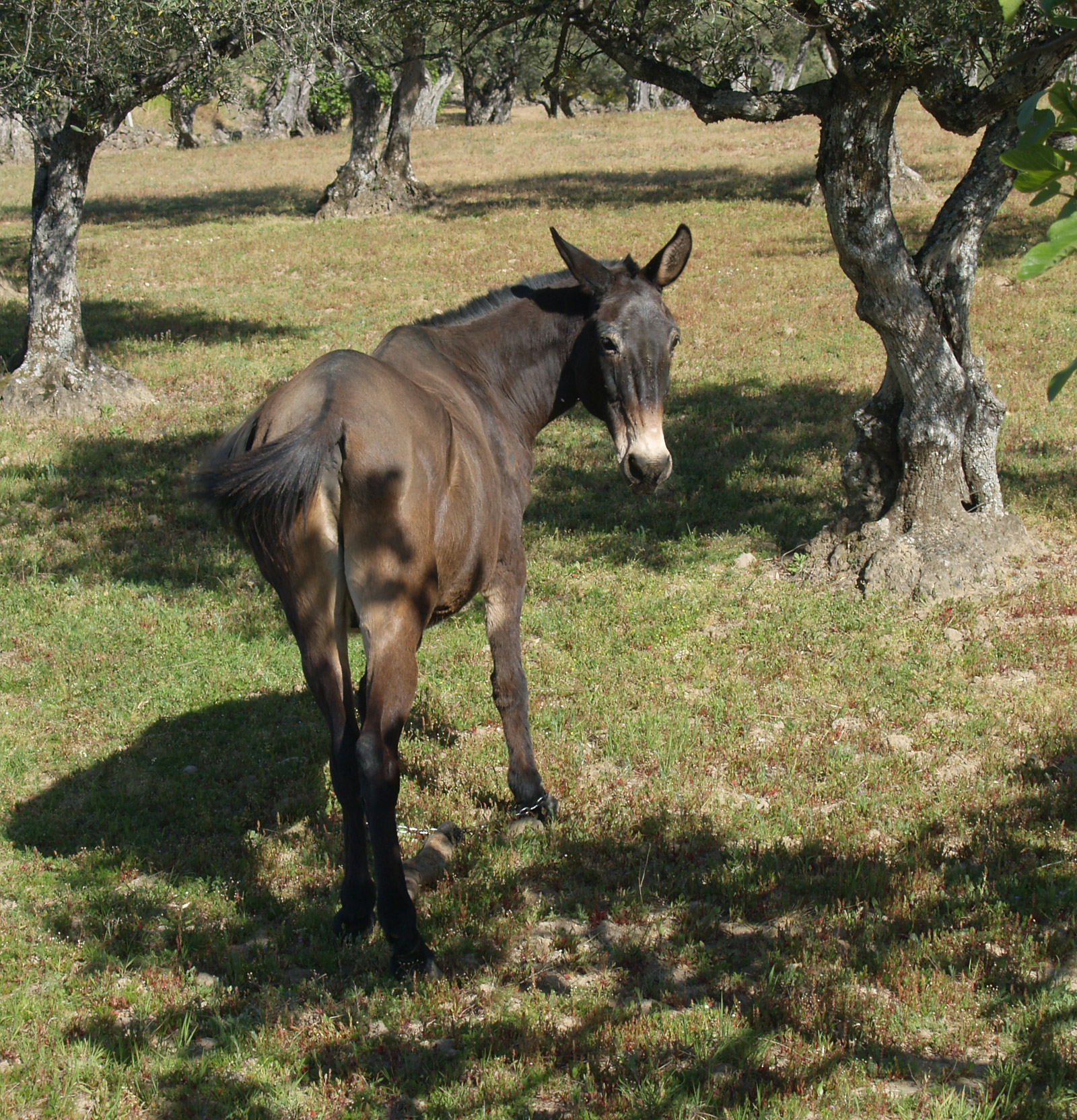 Mulo. Losar de la Vera, Cáceres, España.